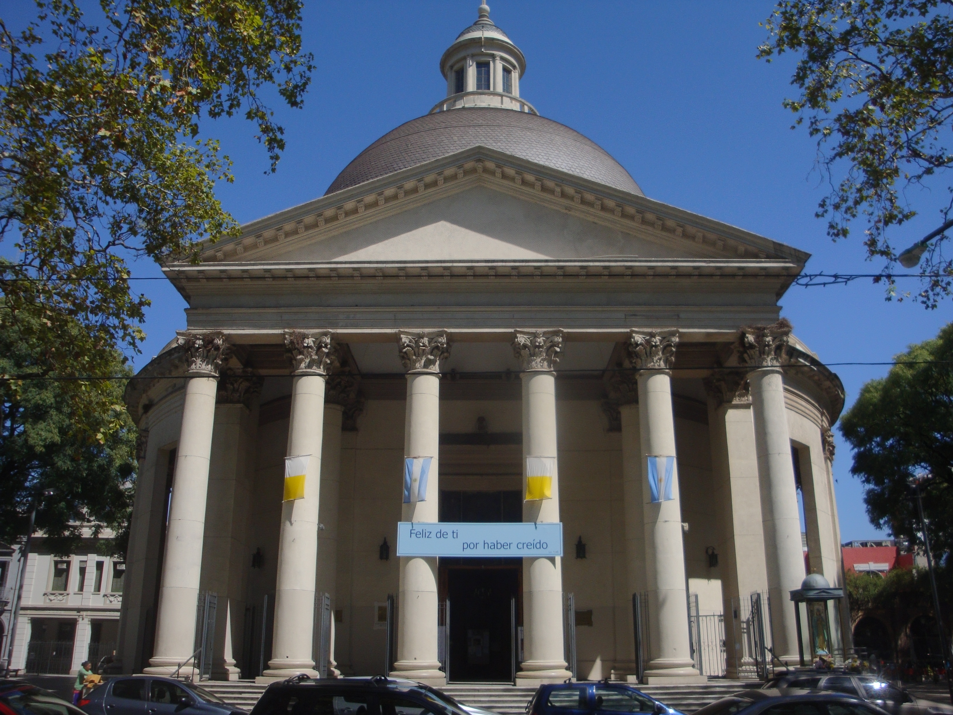 Parroquia de la Inmaculada Concepción, en el barrio porteño de Belgrano.